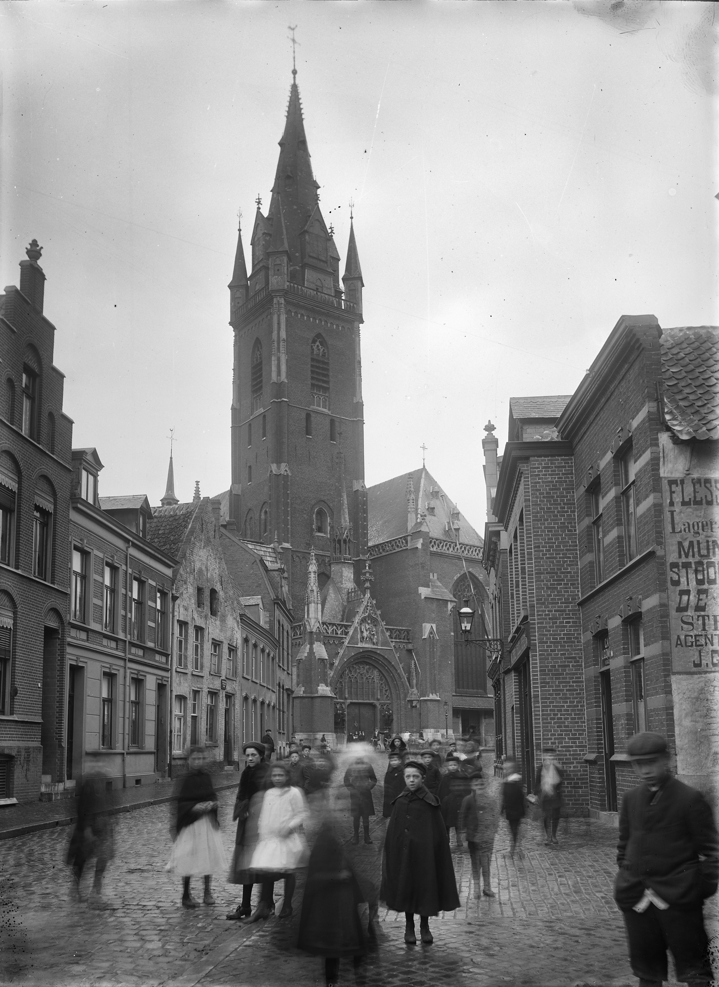 Sint Martinus Of Rooms-Katholieke Kerk: kerk vanuit het noord-westen